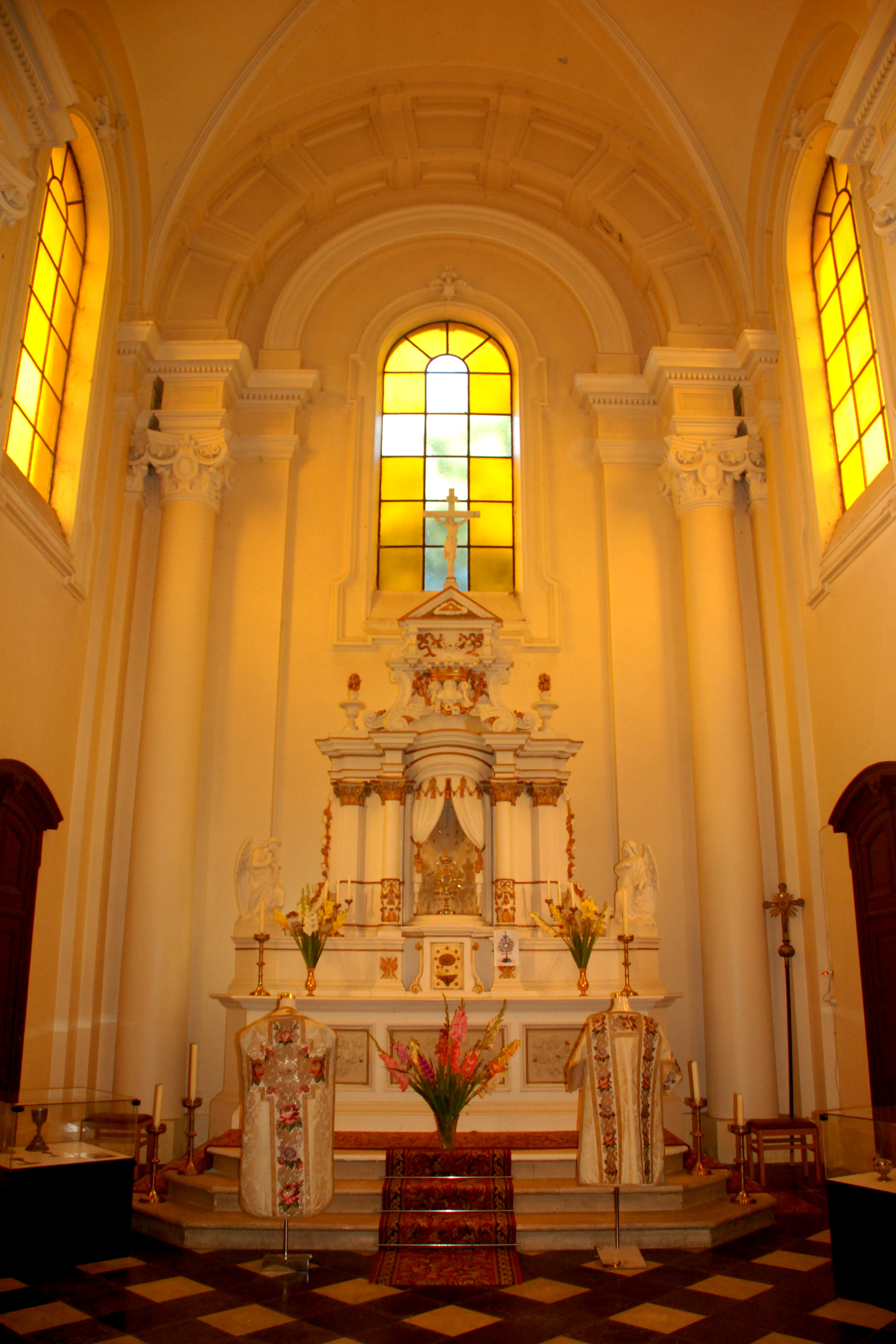 Belgique - Brabant wallon - Chastre - Église Sainte-Gertrude de Gentinnes